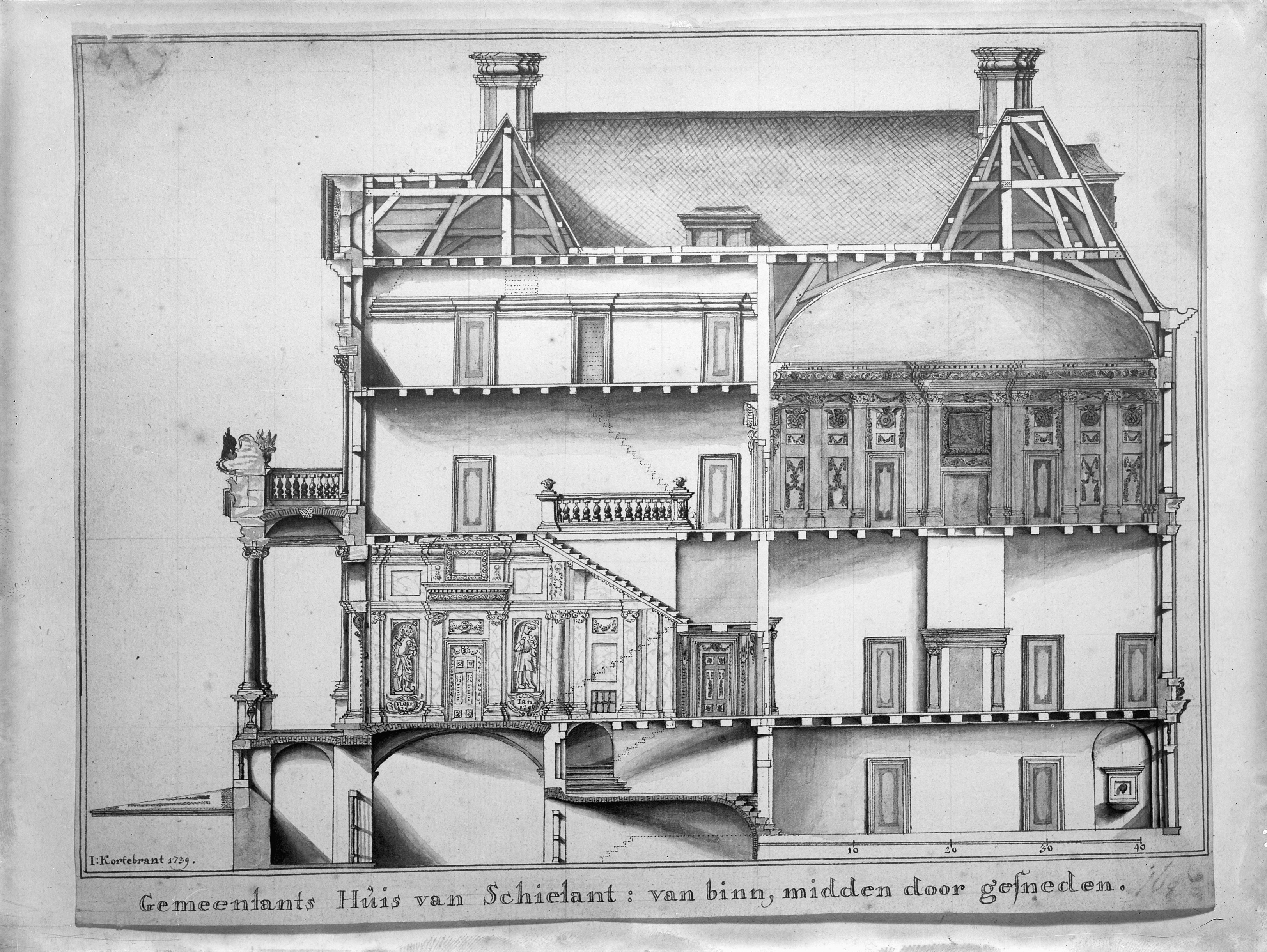 Schielandshuis Museum Boymans: plattegrond, gevels en doorsnede naar tekening van Kortebrand 1739 in het Gemeente Archief Rotterdam